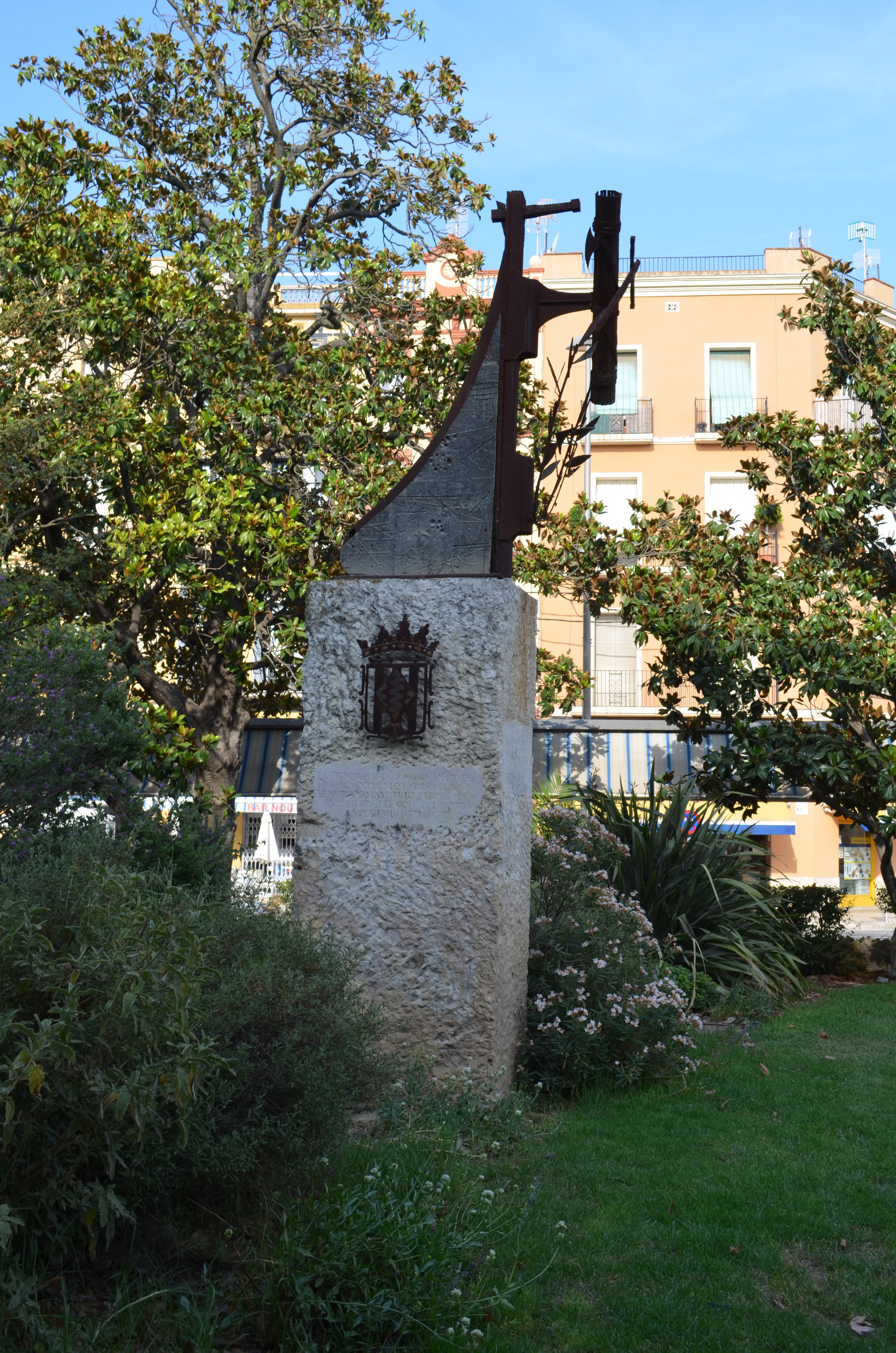 Tortosa, Parc de Teodor Gonzàlez, MONUMENT COMMEMORATIU A LA GUÀRDIA CIVIL